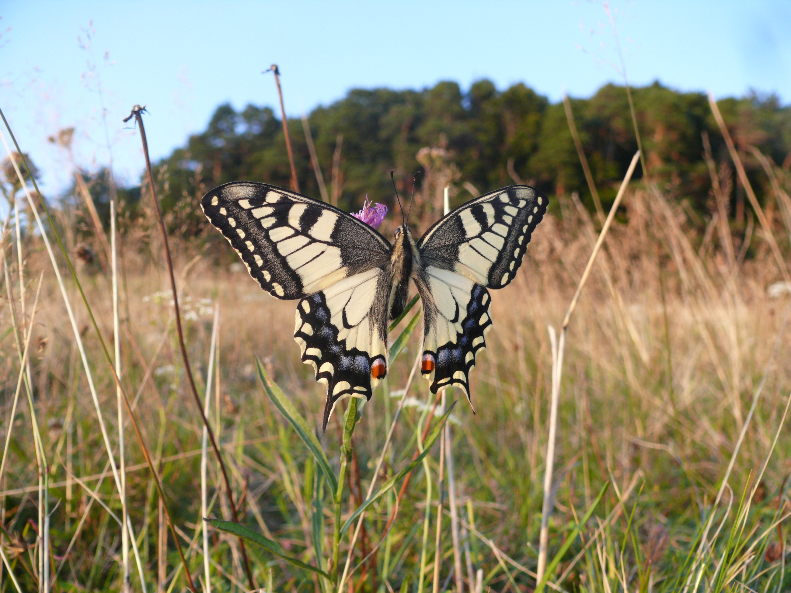 Papilio machaon, Frankenhöhe, Deutschland